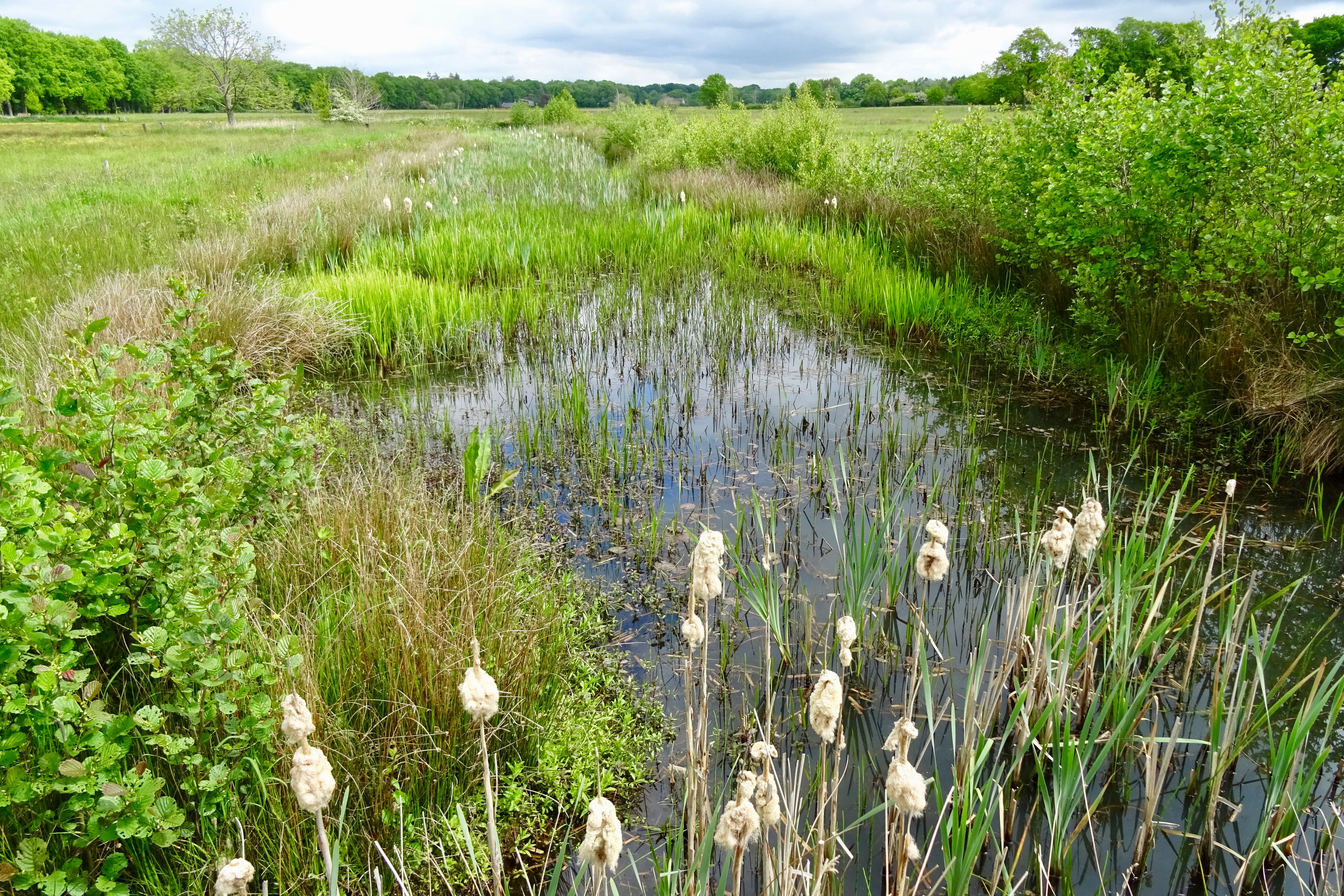 De Besloten Venen in het Drentsche Aagebied